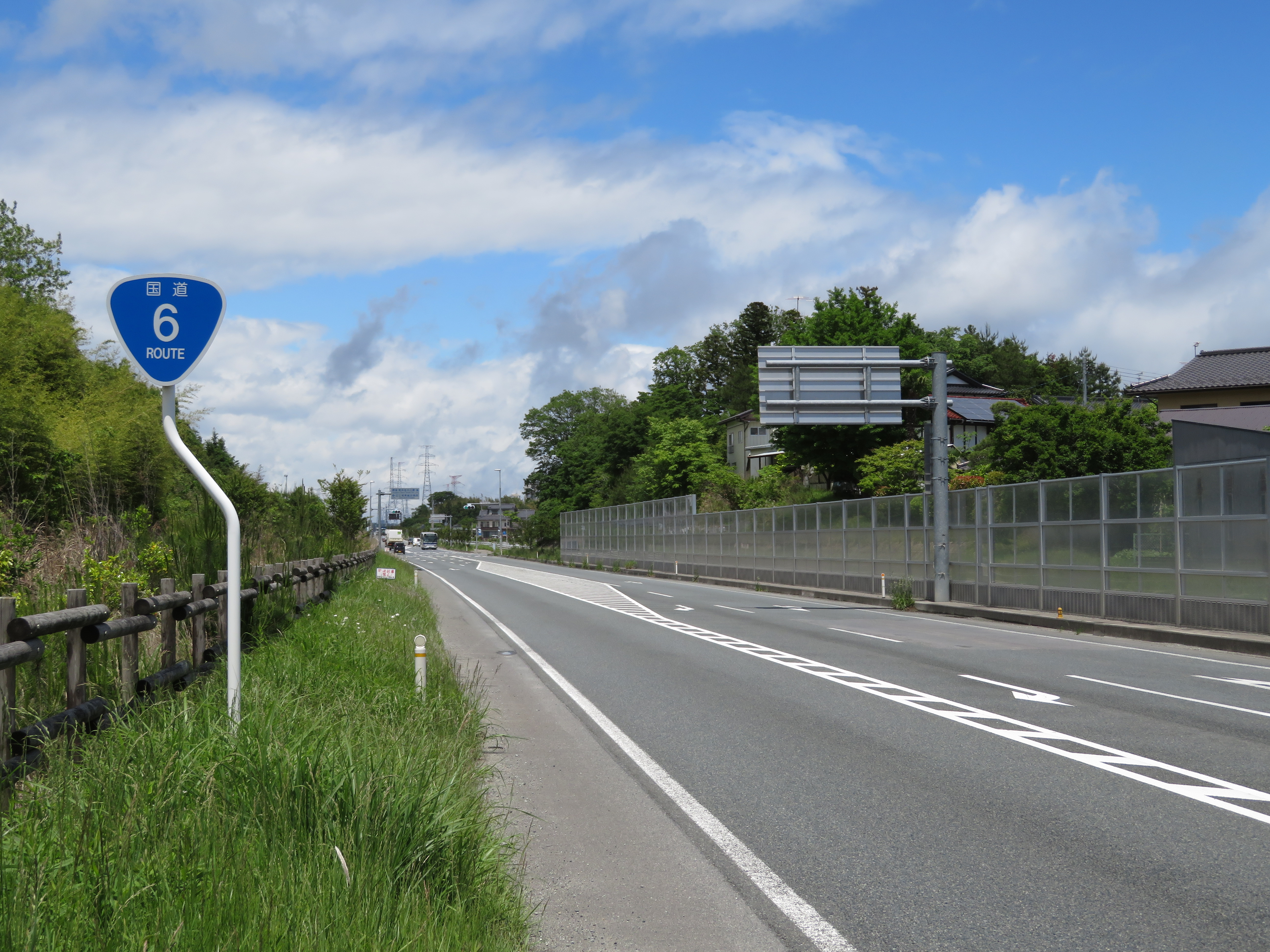 国道6号線相馬バイパス 福島県相馬市尾浜細田付近（新地方面を撮影） Canon PowerShot SX720 HS